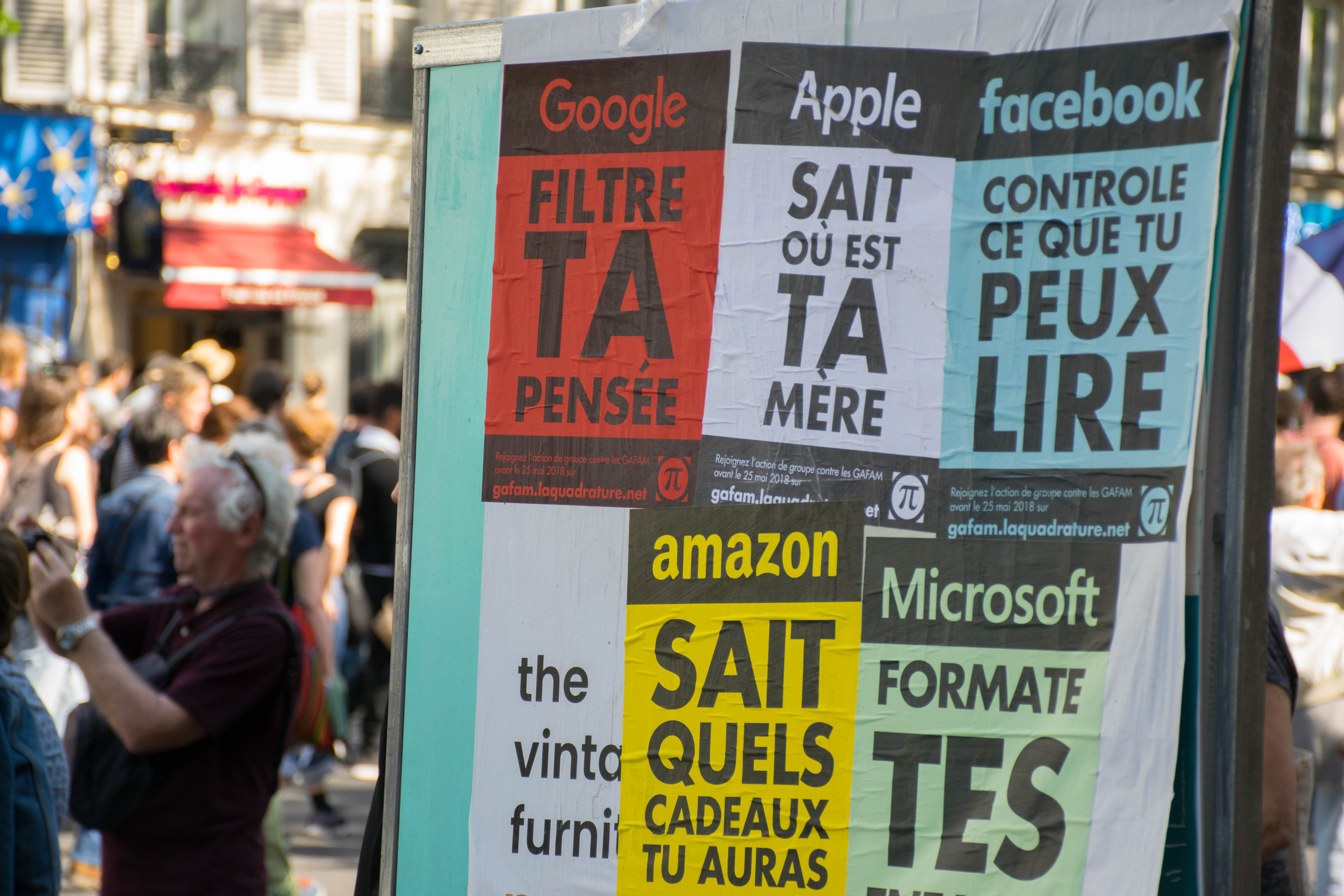 Manifestation organisée par La France insoumise (LFI) le 5 mai 2018 et intitulée « La Fête à Macron ». Parcours entre Opéra et Bastille.